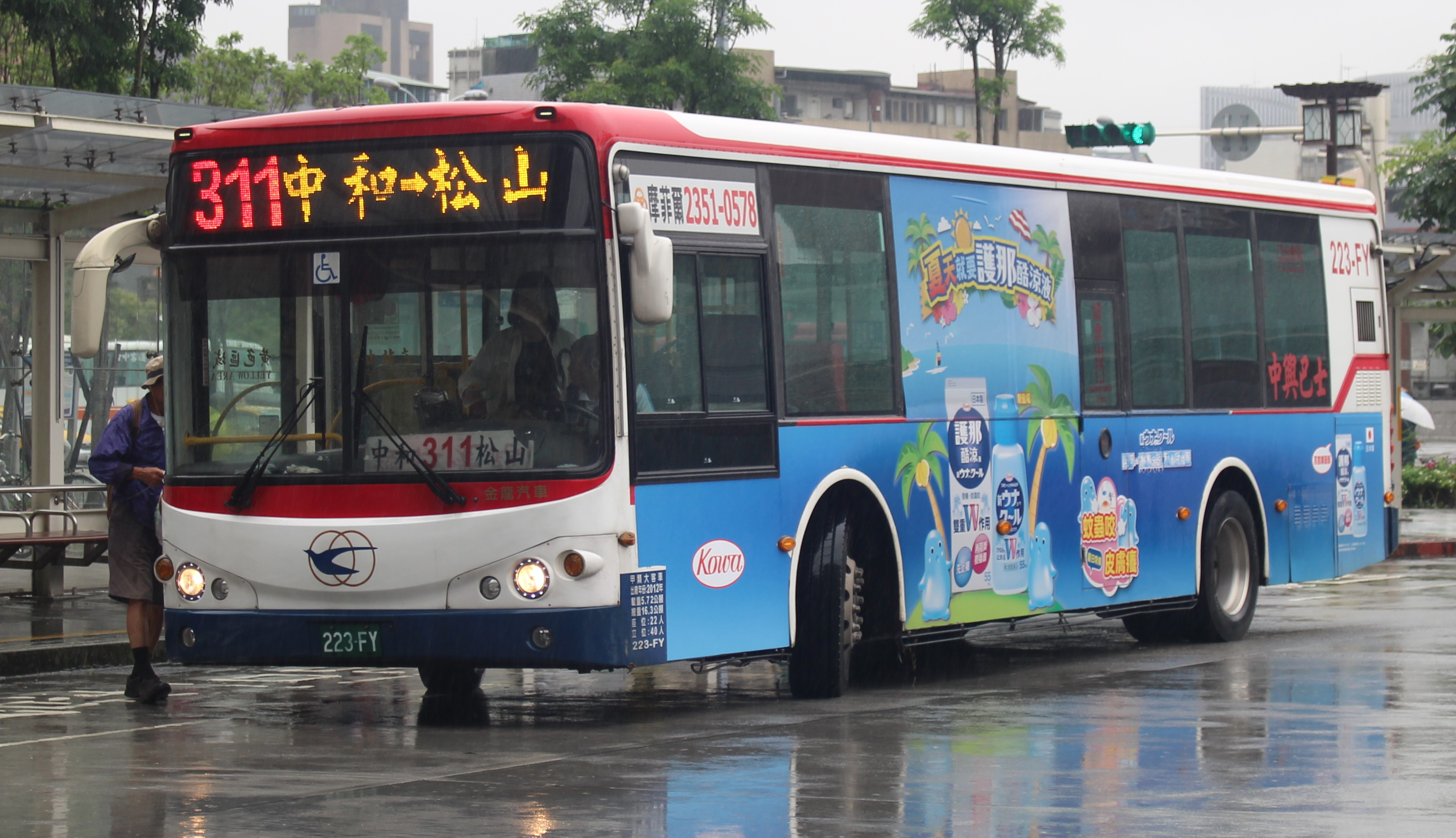 中興巴士 2012 KINGLONG KL6112U1 223-FY 311